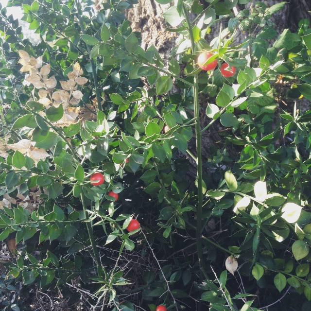 Galzeran a la soca d'una olivera centenària